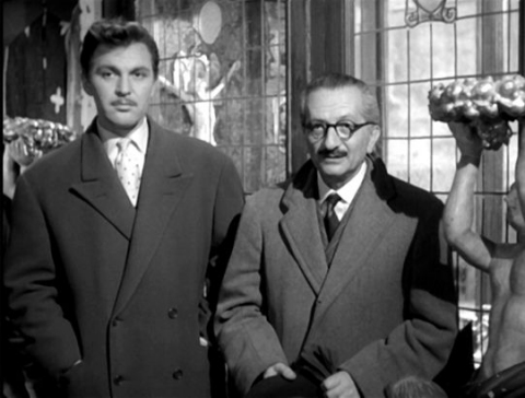 Screenshot del film I vitelloni (1953)